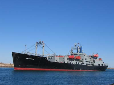 Enterprise